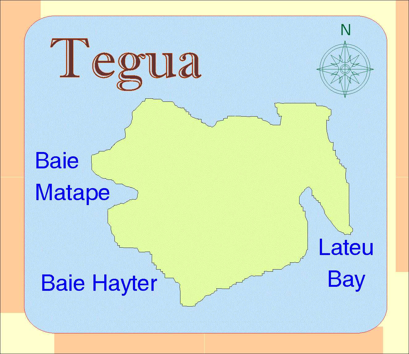 Карта на остров Тегуа.